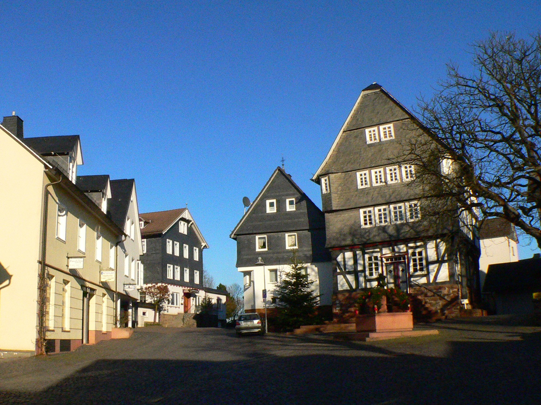 Battenberg (Hessen) - Alter Markt